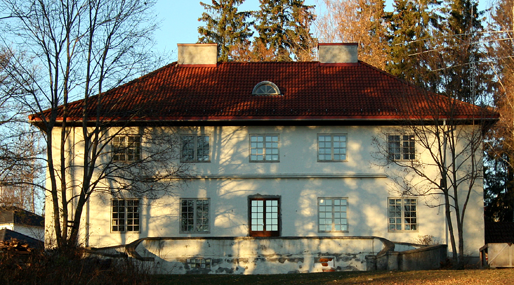 «Hamarhus», Aluvegen 42, Hamar. Bygd ca. 1923. Arkitekt: Ole Øvergaard.